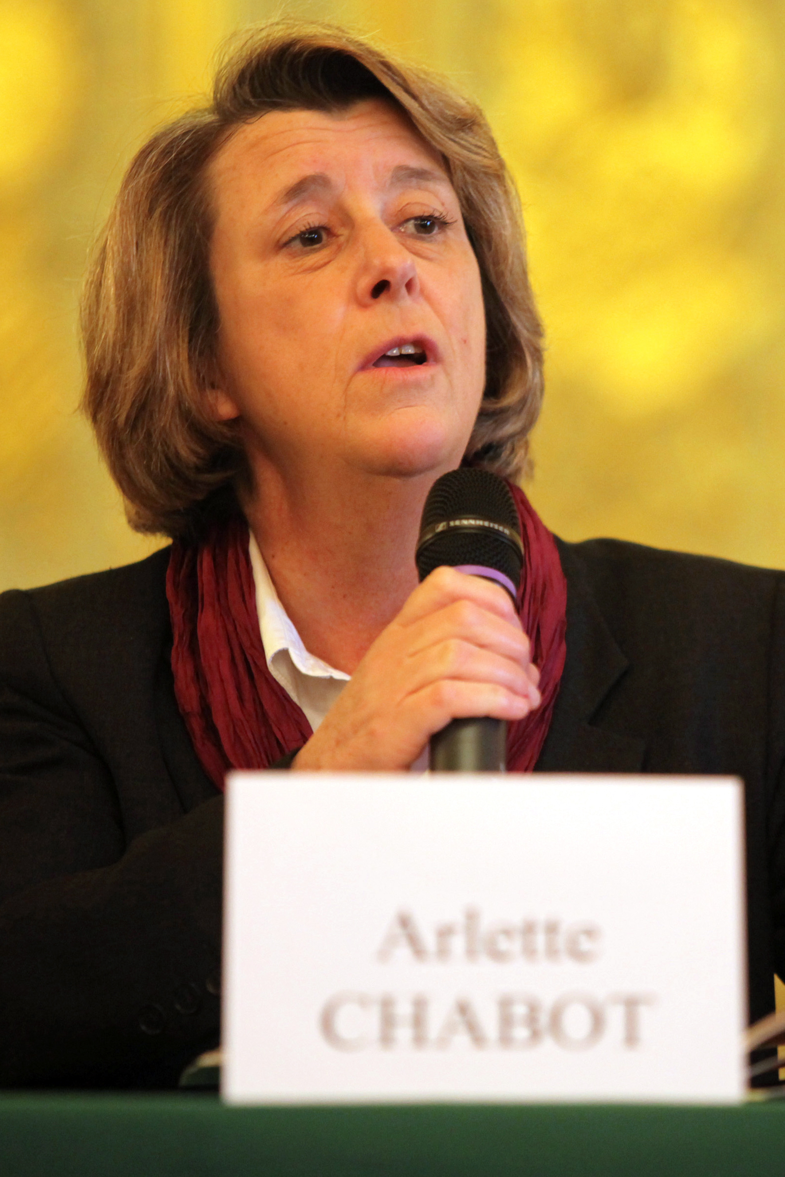 Arlette Chabot à la journée du livre politique, en avril 2009.